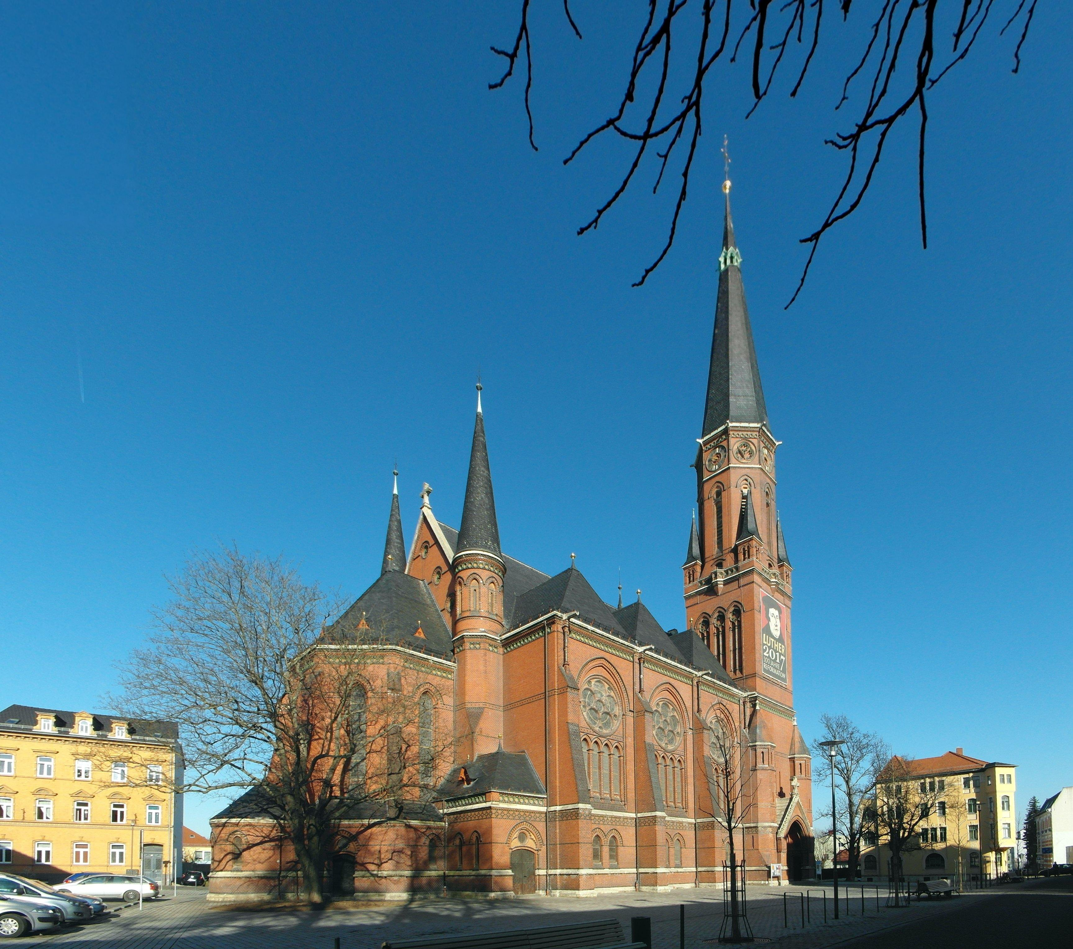 Lutherkirche Apolda